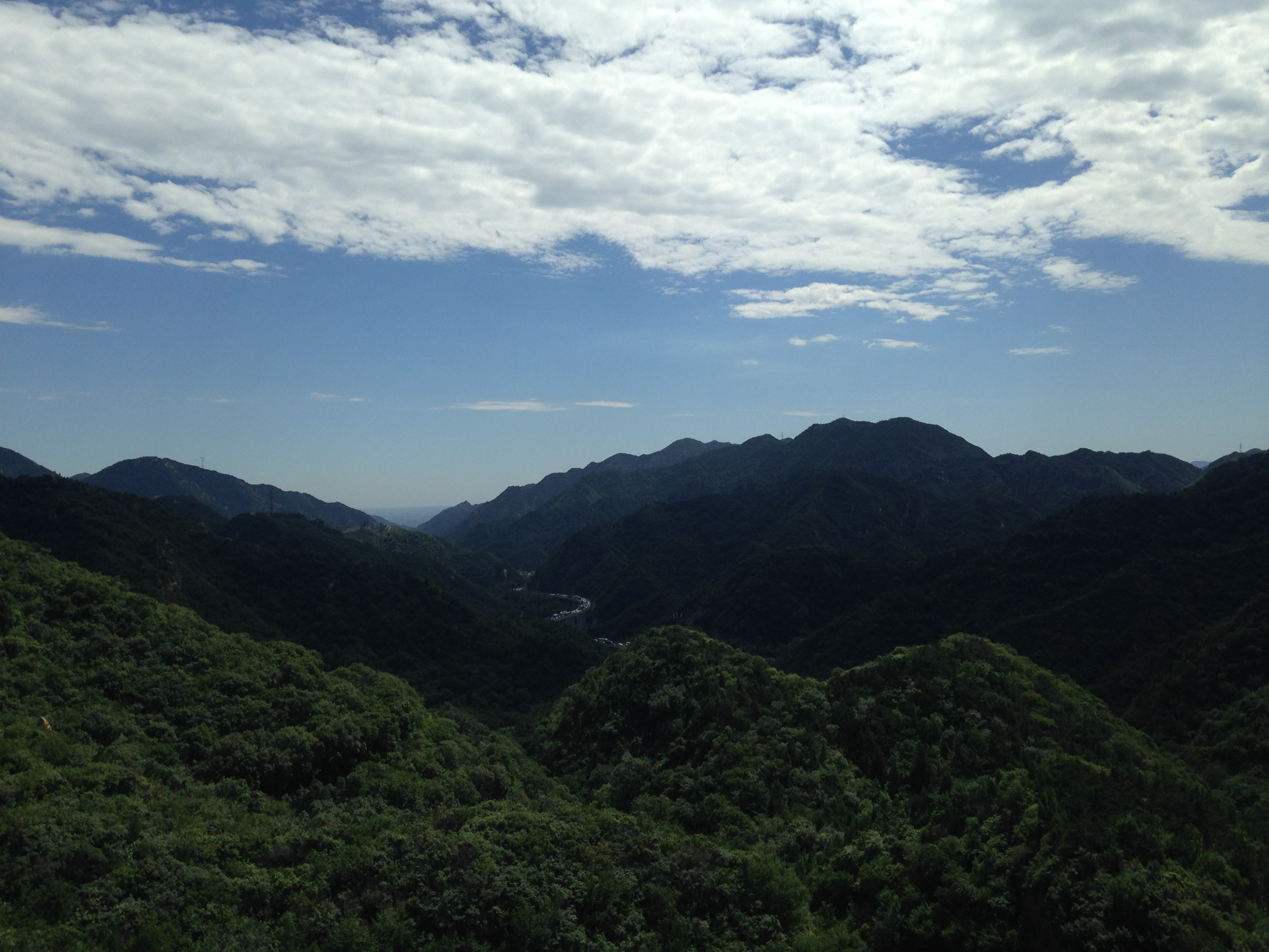 北四楼付近の八達嶺長城より南側を望む